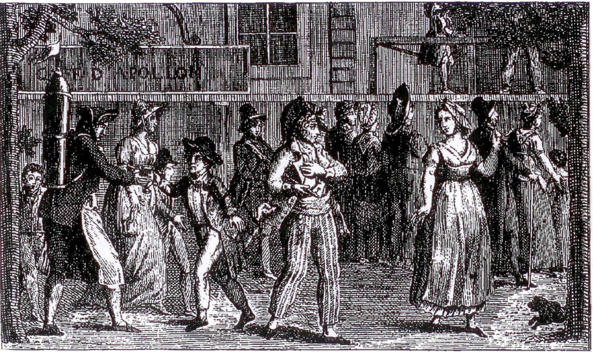 Illustration